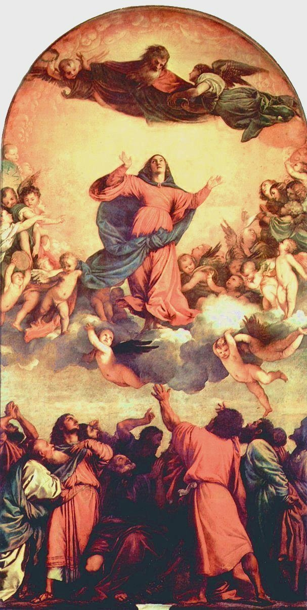 Tizian: Maria Himmelfahrt, Hochaltar für Santa Maria Gloriosa dei Frari in Venedig, 1516–1518